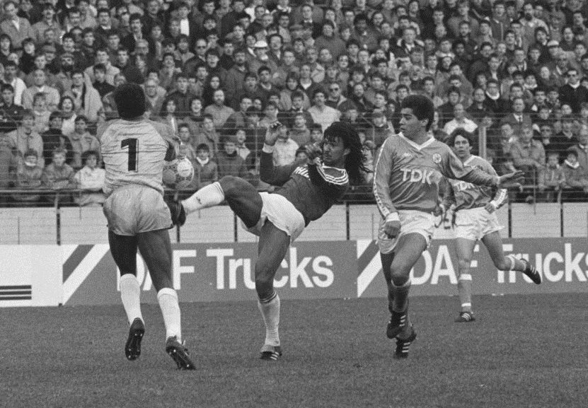 PSV tegen Ajax 1-0; Ruud Gullit in duel met Menzo.